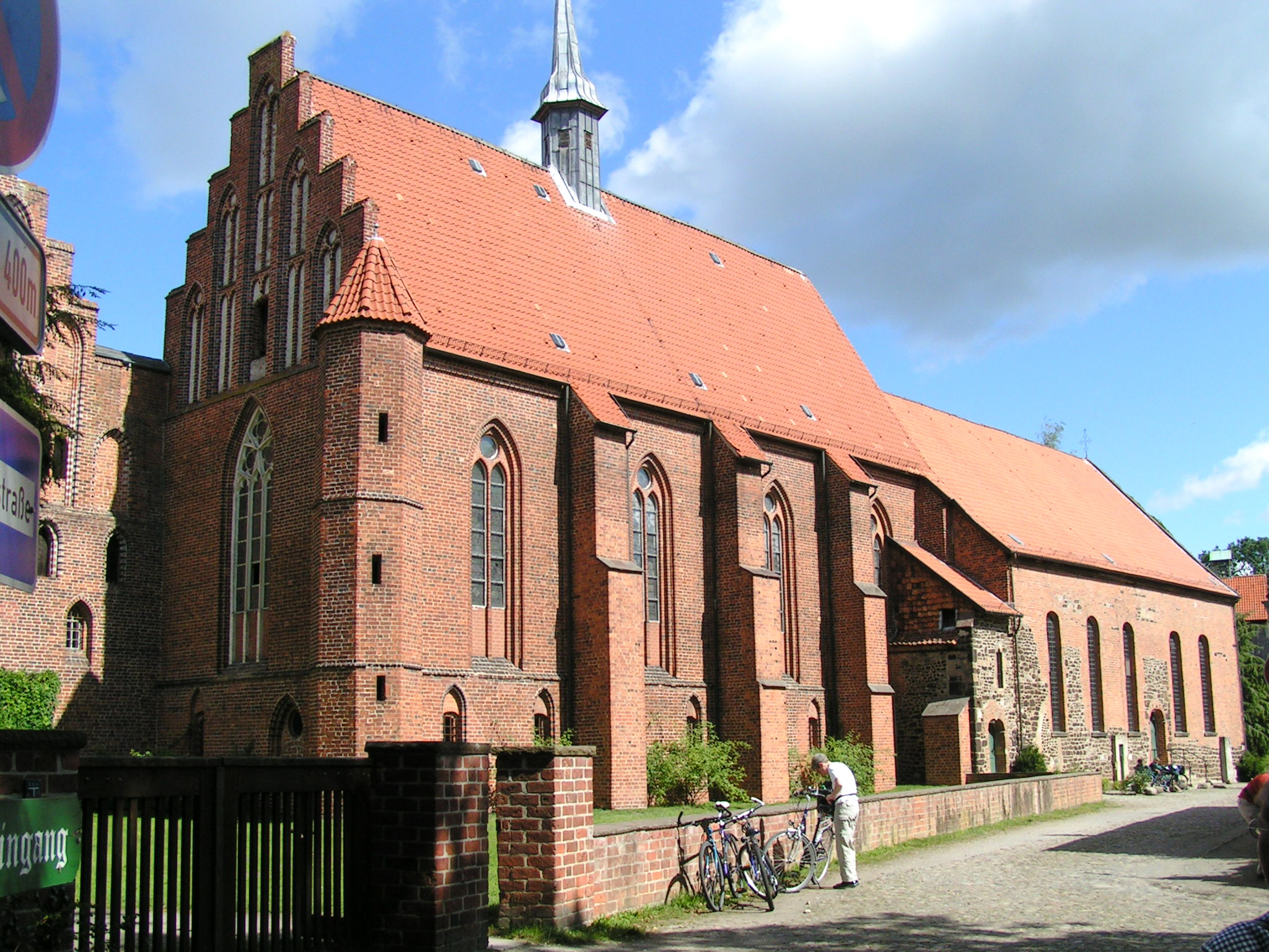 Wienhausen monastery at Wienhausen, Celle district, Germany